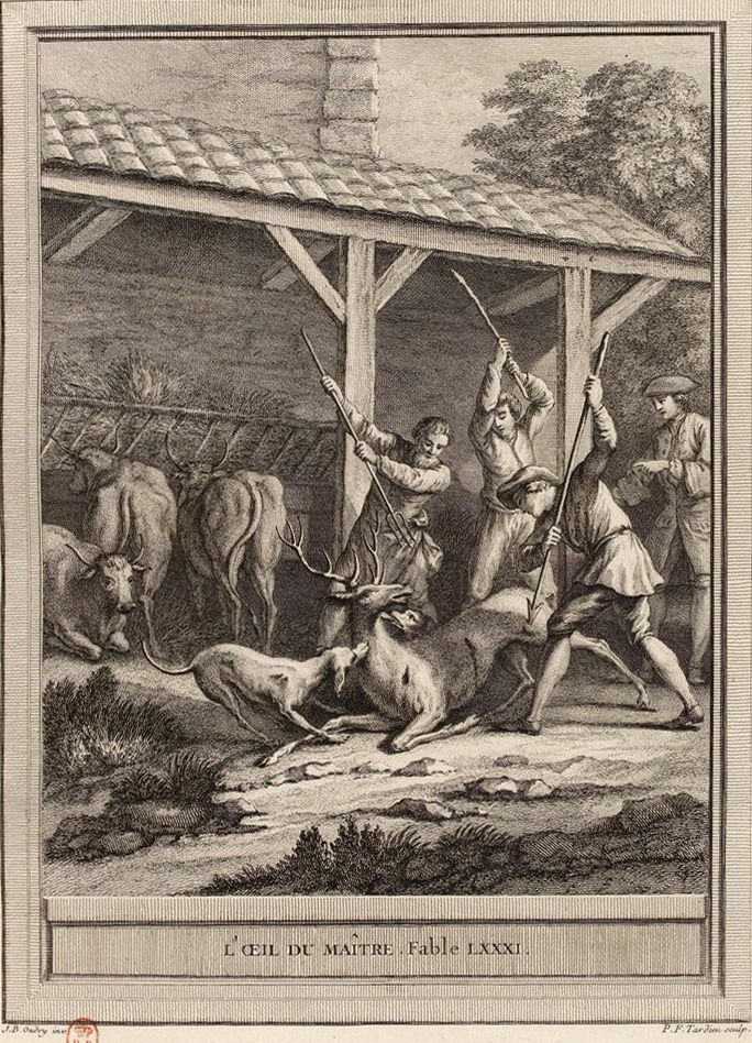 Gravure réalisée par Pierre François Tardieu d'après un dessin de Jean-Baptiste Oudry représentant la fable L’œil du maître de Jean de La Fontaine (fable 21 du livre IV). Cette gravure est parue dans l'édition complète des fables de La Fontaine, parue en quatre tomes chez l'éditeur Desaint & Saillant, rue saint Jean de Beauvais à Paris, 1755-1759.